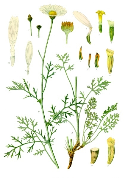 Dalmatinische Insektenblume. A unterer Teil der Pflanze. B oberer Teil der Pflanze. 1 u. 2 — Knospe; 3 Blütenboden im Längsschnitt; 4 Randblüte; 5 Scheibenblüte; 6, 7, 8 Hüllkelchblätter; 9 Fruchtknoten der Randblüten; 10 Frucht der Randblüten; 11 dieselbe im Querschnitt; 12 Frucht der Scheibenblüte; 13 Nervatur der Randblüte von Chrysanthemum cinerariaefolium; 14 Nervatur der Randblüte von Chrysanthemum Leucanthemum. A, B 1 in natürlicher Grösse; 2—12 vergrössert.